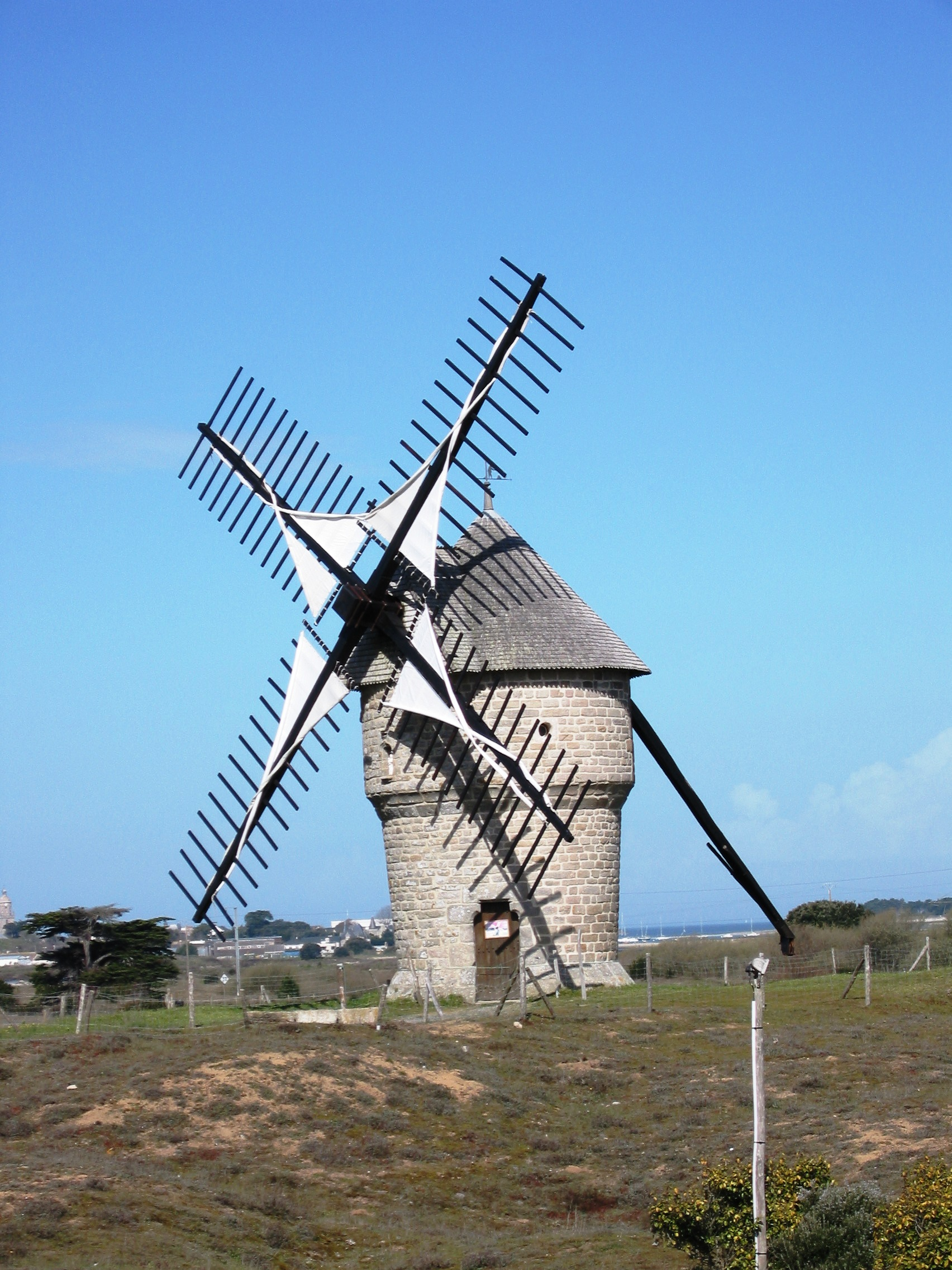 Batz sur Mer, Moulin à vent, Photo prise par Harrieta171 le 24/03/05